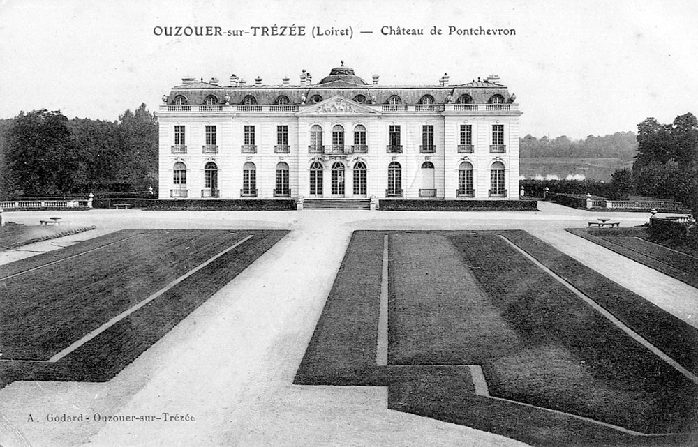 Château de Pontchevron, Ouzouer-sur-Trézée, Loiret, France